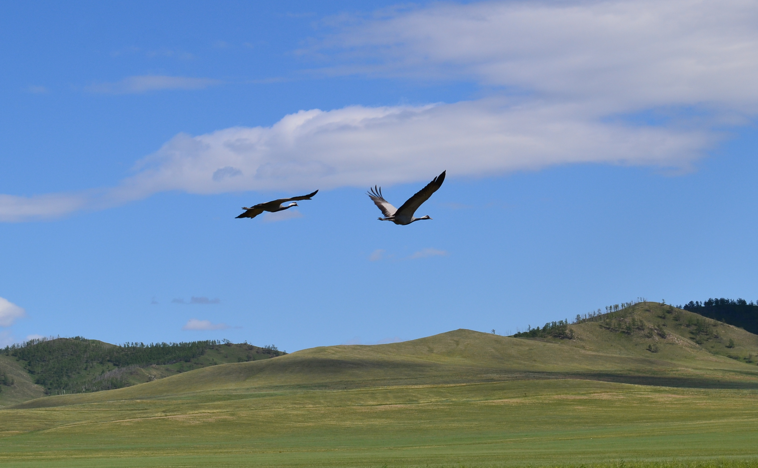 Журавли-красавки в Цагатуйской долине. Джидинский район, Бурятия